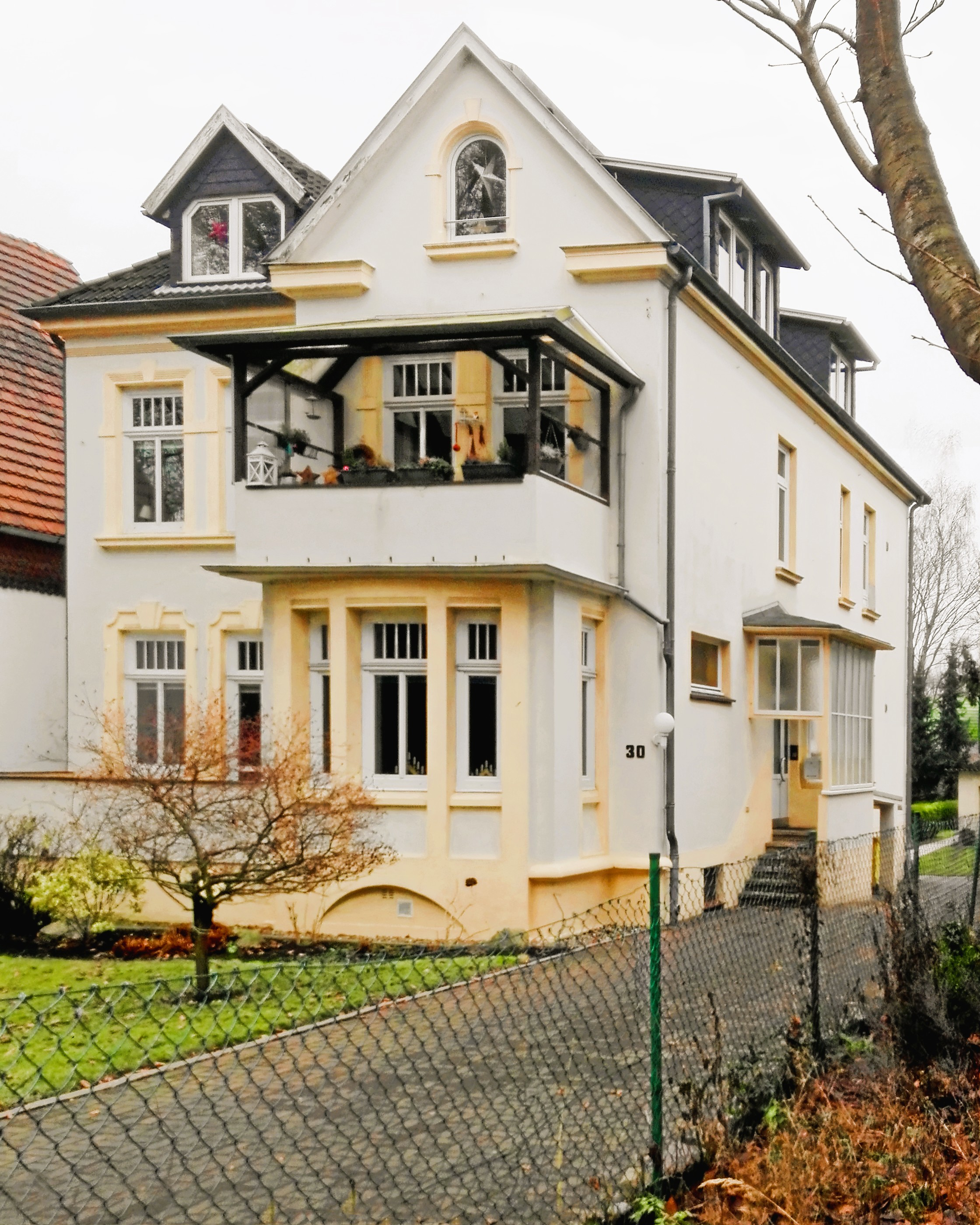 Dies war von Mitte der 1890er bis zu seinem Tde der Alterswohnsitz von August Lüderitz in Bad Schwartau.